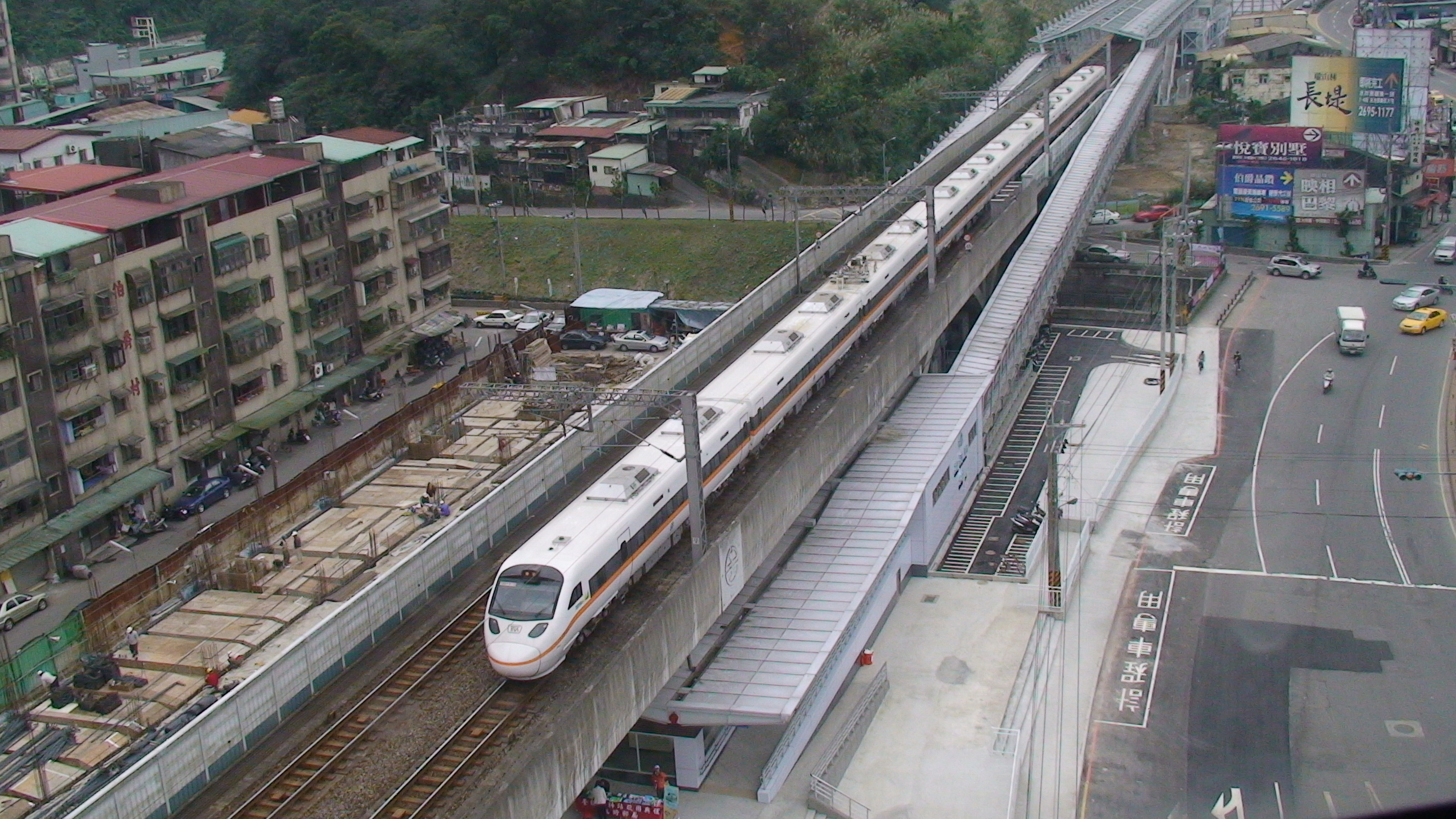 臺灣鐵路管理局TEMU1000型電聯車通過縱貫線汐科站北站房，左側工地為第三軌施工工程。